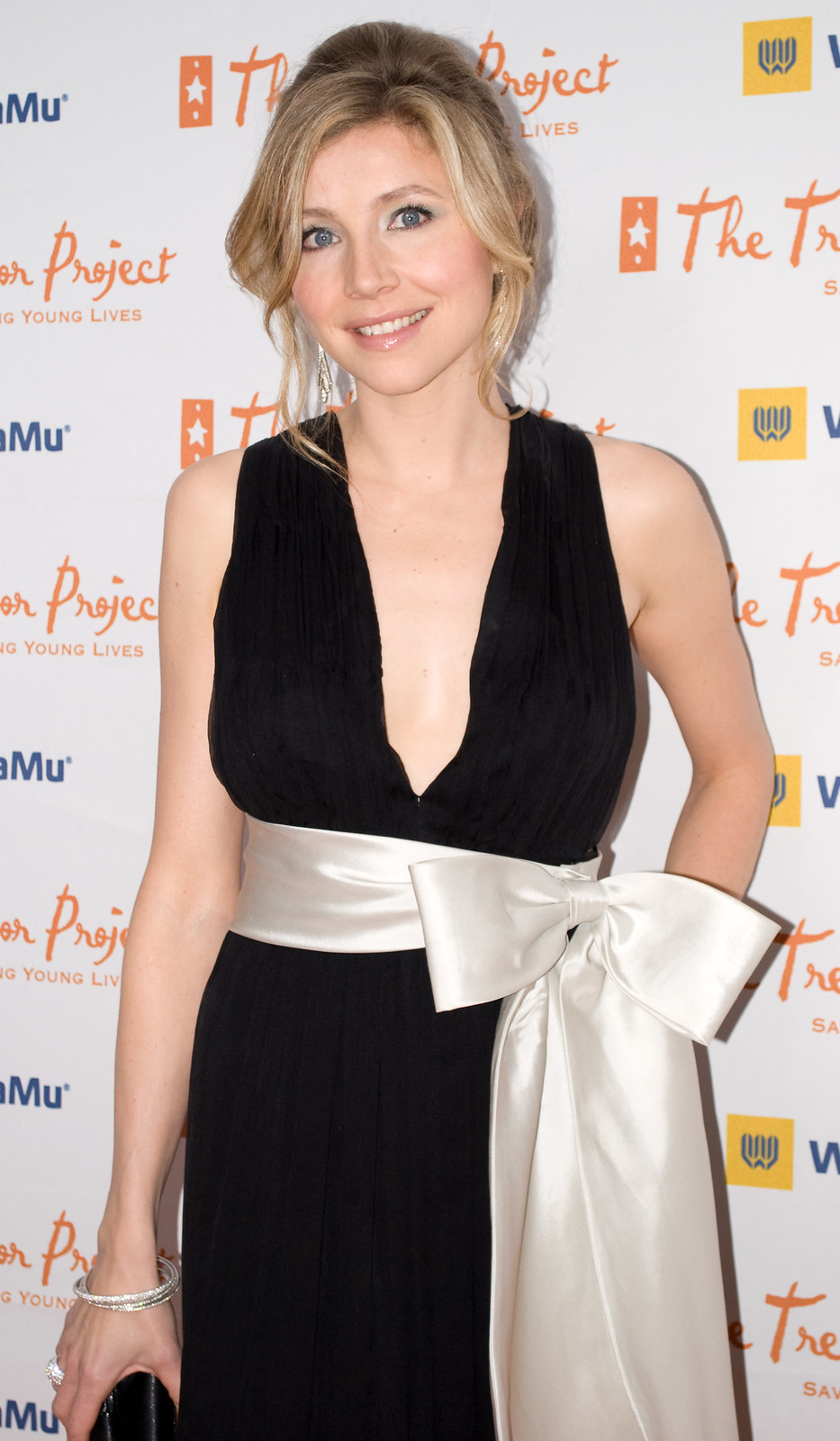 Sarah Chalke in Sanford, Los Angeles